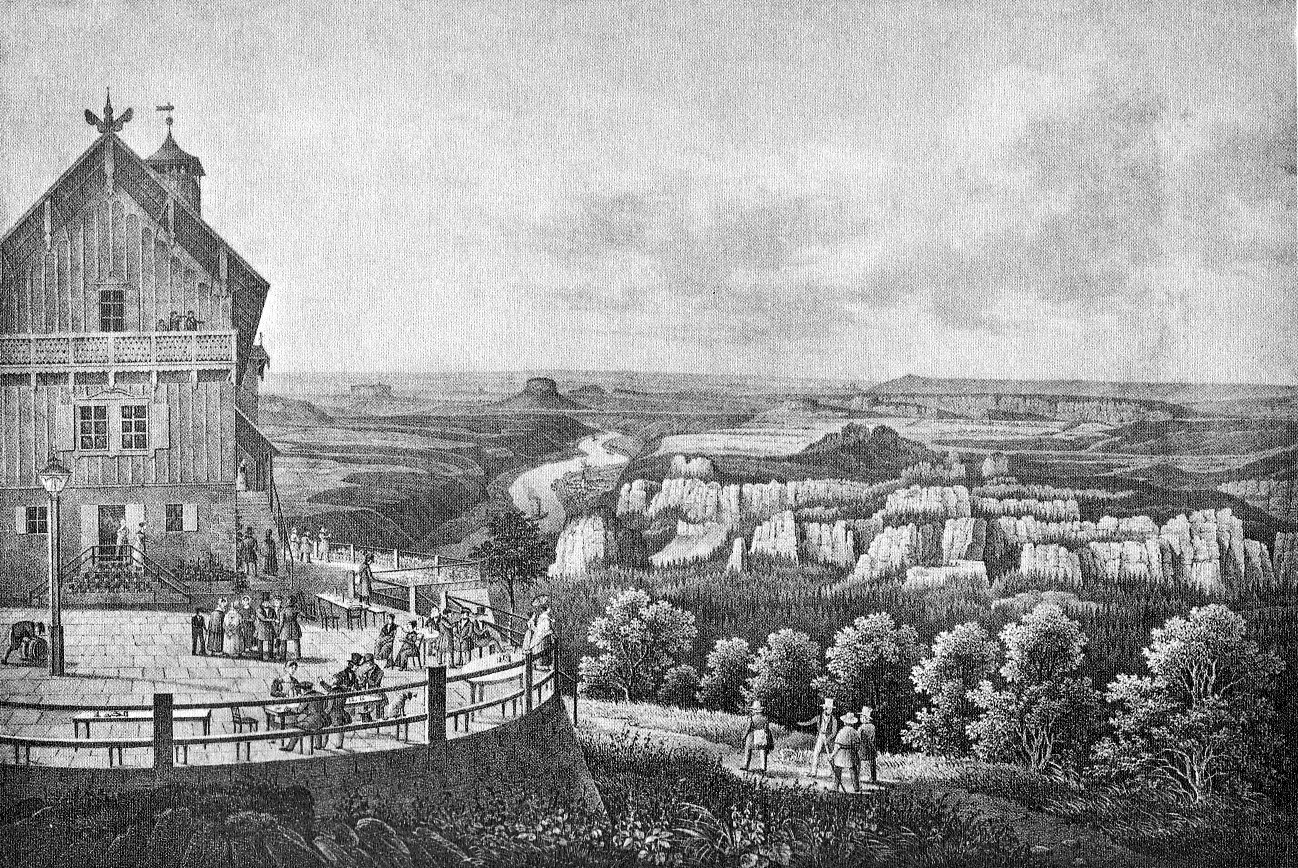 Historische Ansicht der Sächsischen Schweiz an der Elbe in Sachsen. Stahlstich.